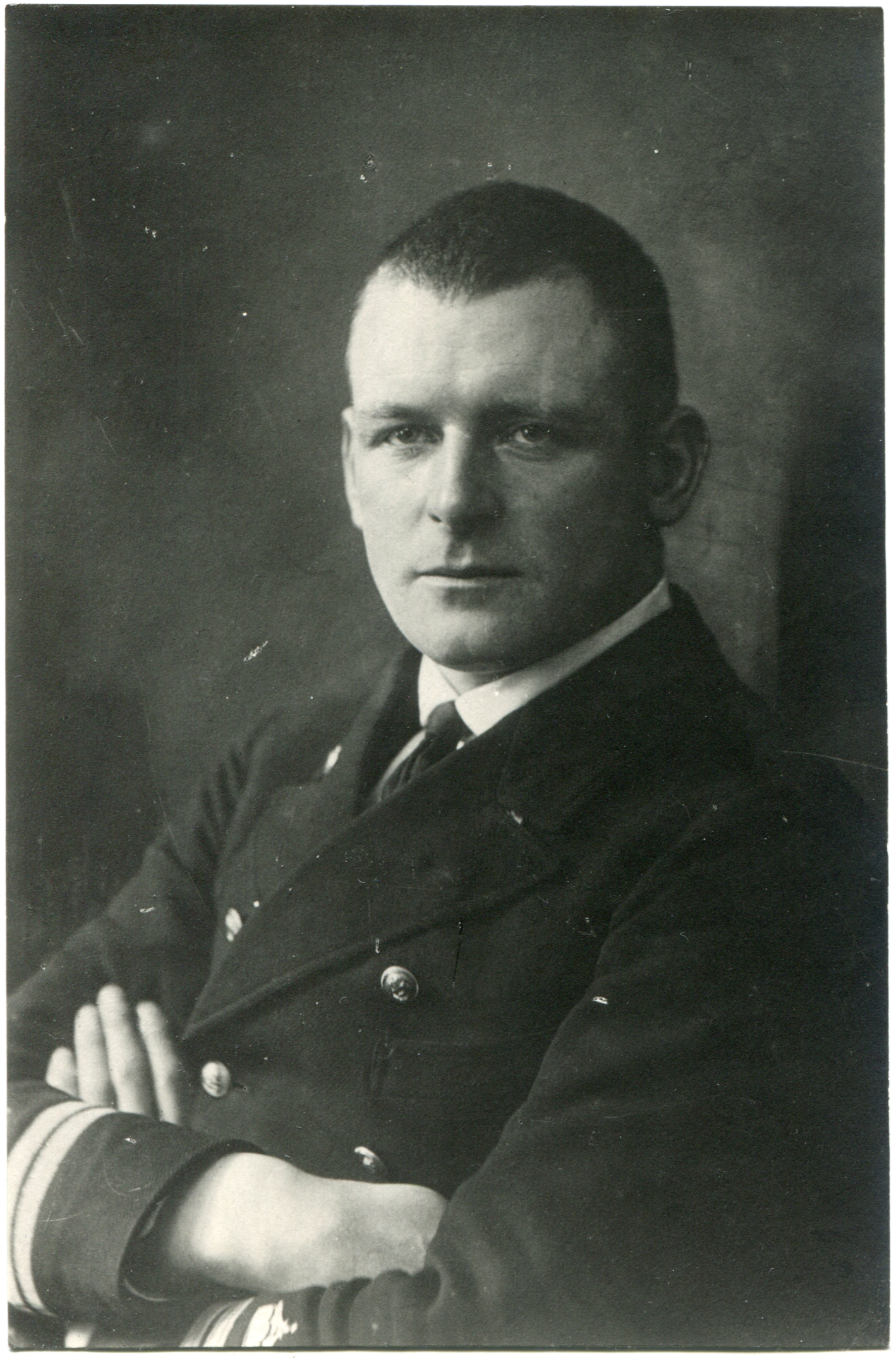 Почтовая открытка. Капитан-лейтенант Макс Валентинер, фотография